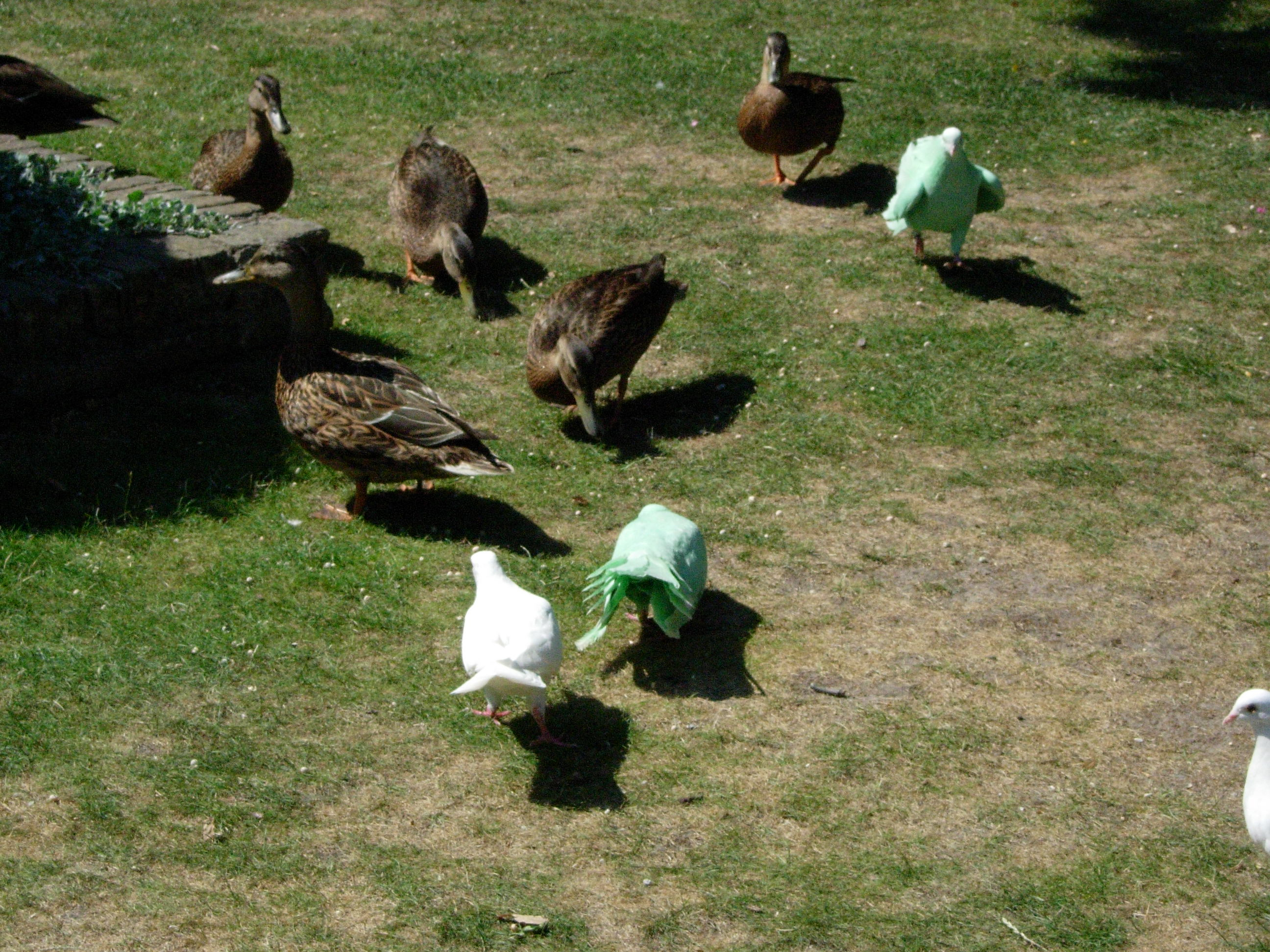 La robe de mariée de Geneviève - pigeons colorés